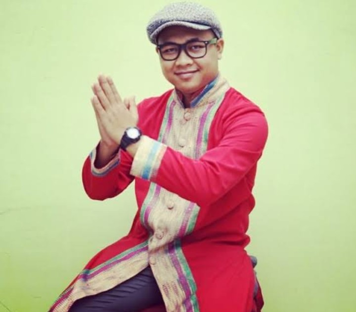 Pendongeng Bogor Kak Iki